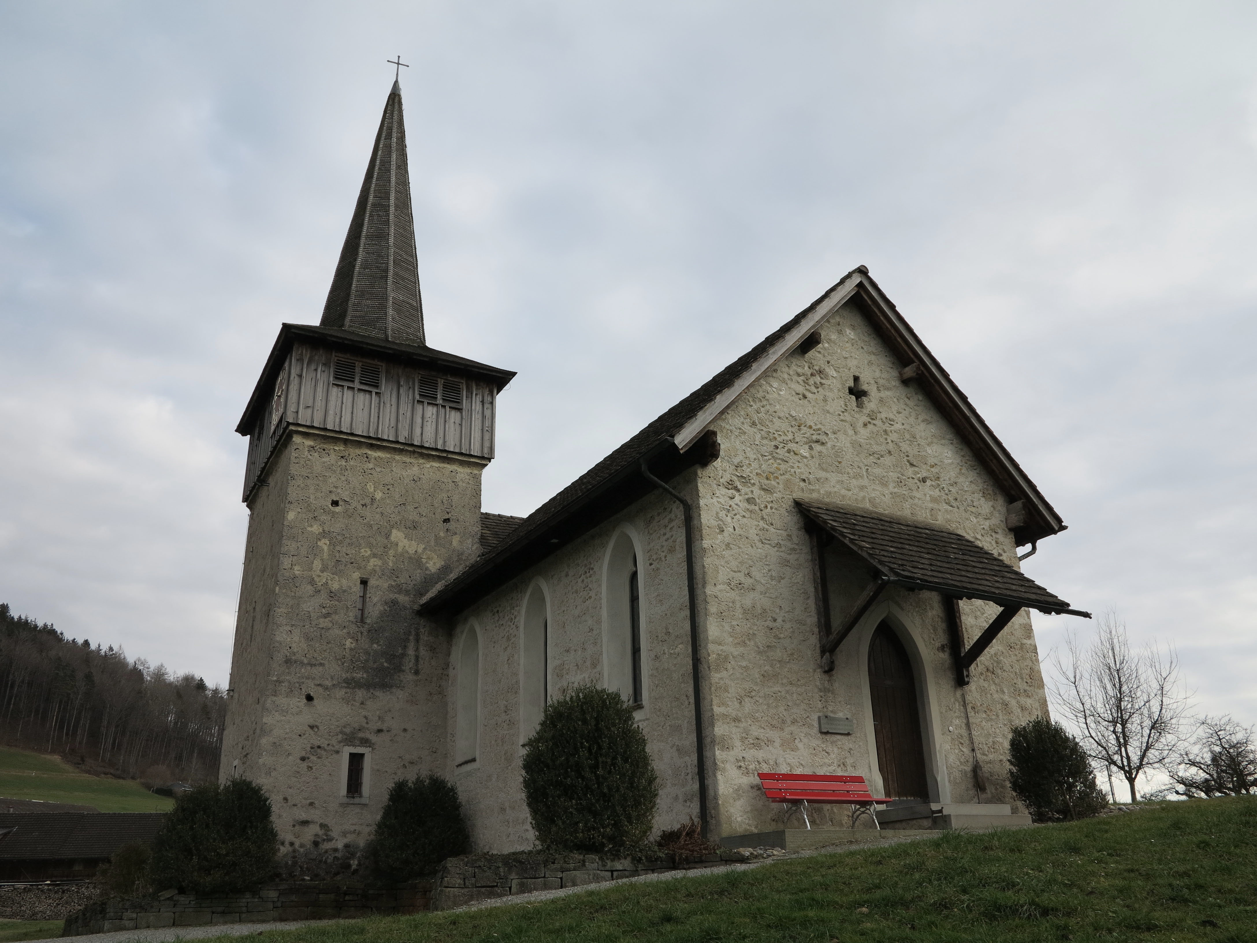 Aussenansicht der Kapelle St. Bartholomäus, Tufertschwil